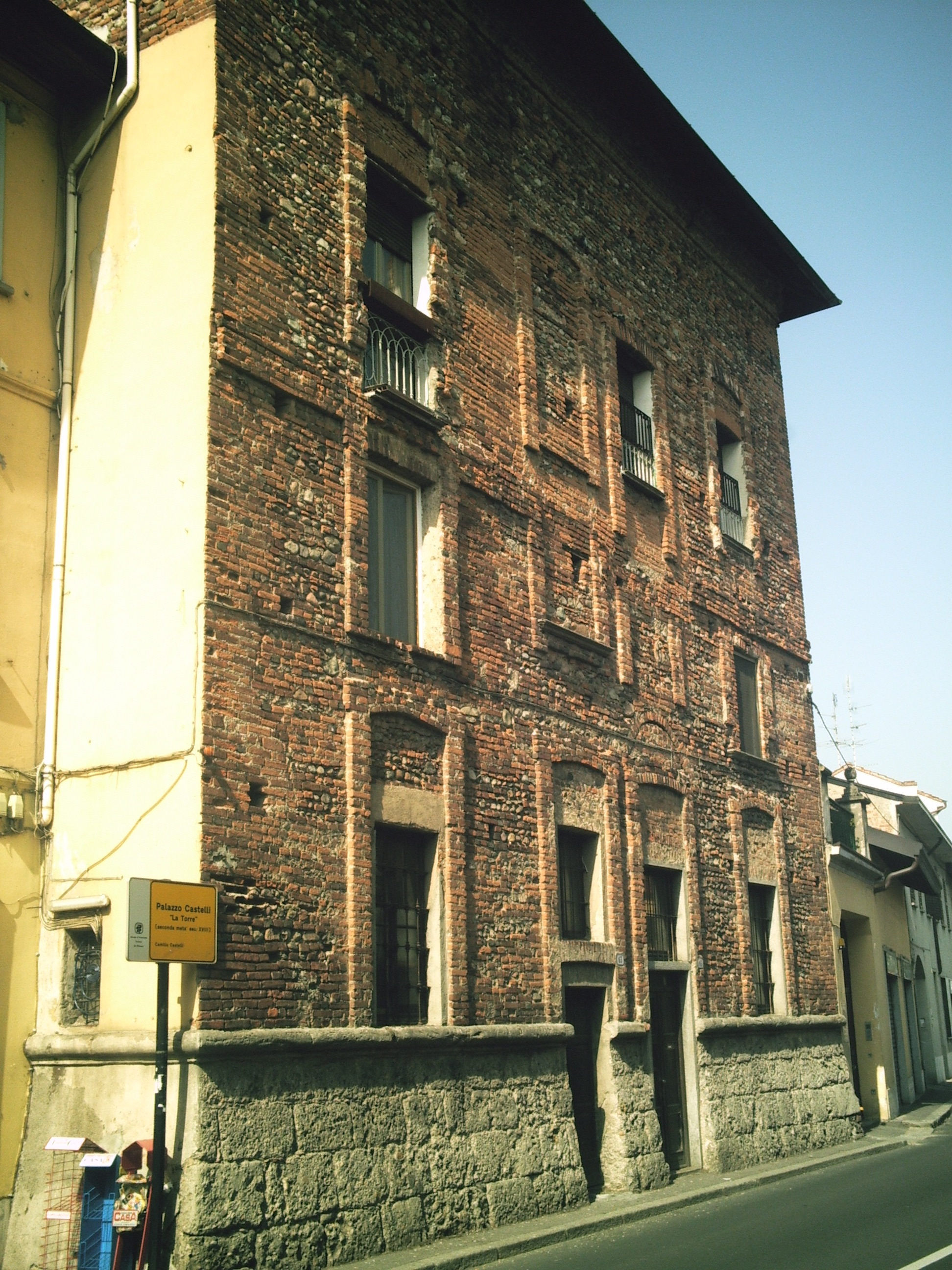 Lato fronte strada di Palazzo Castelli